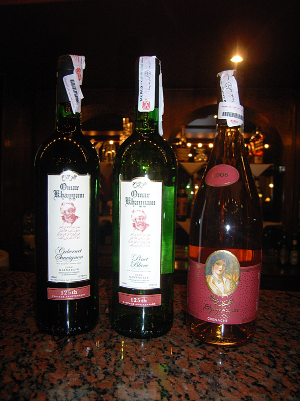 Ägyptische Weine)